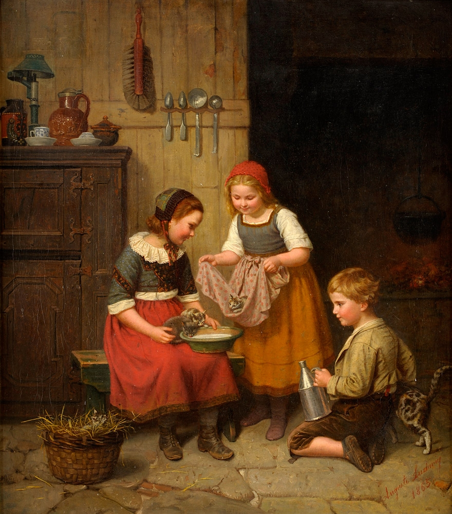 Katzenbande. Signiert. Datiert 1865. Öl auf Leinwand, 72 x 65 cm